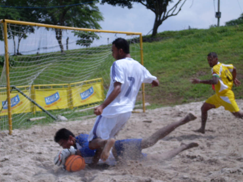 my galery